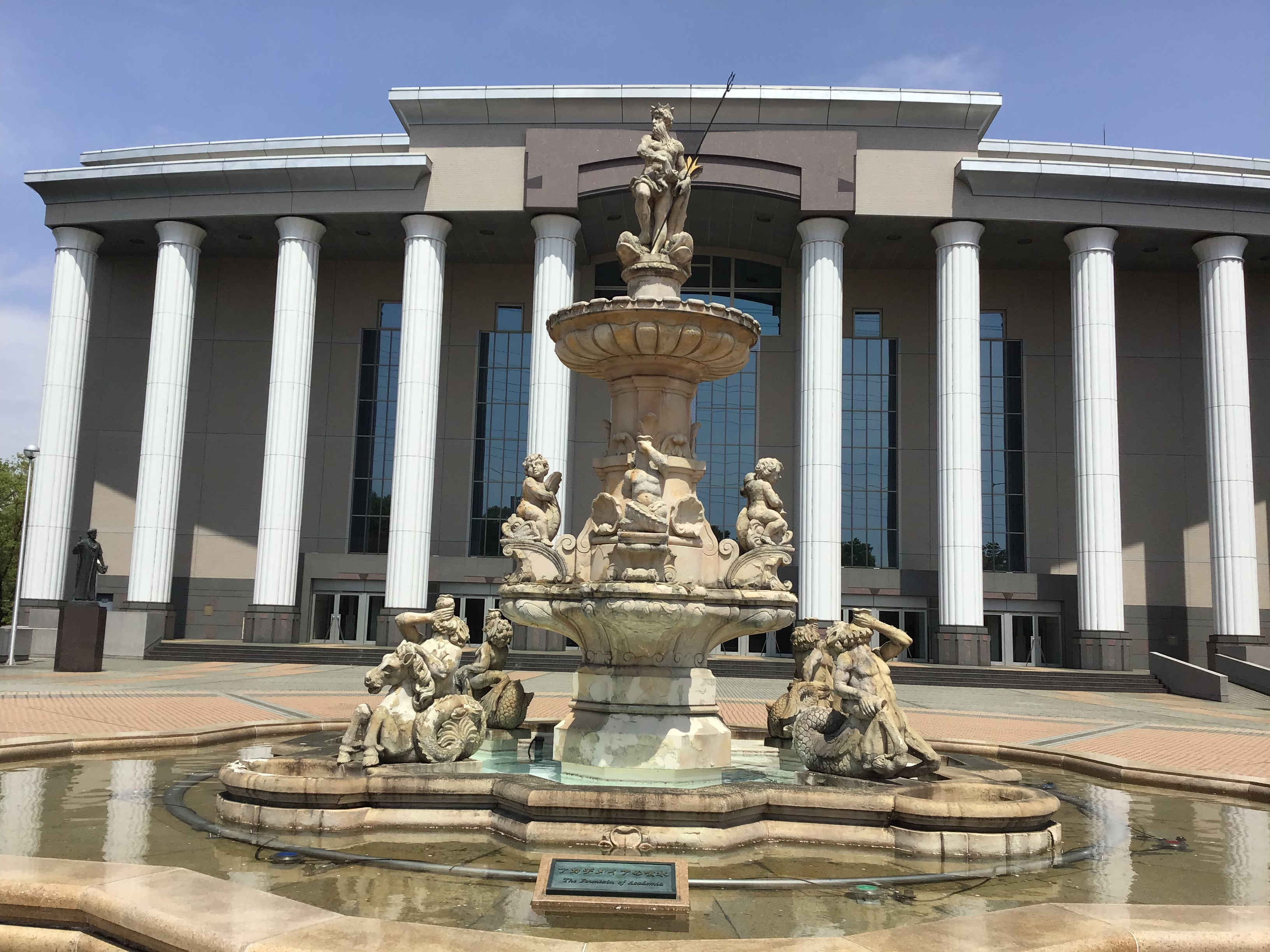 八王子市。創価大学池田記念講堂。2019年4月撮影。